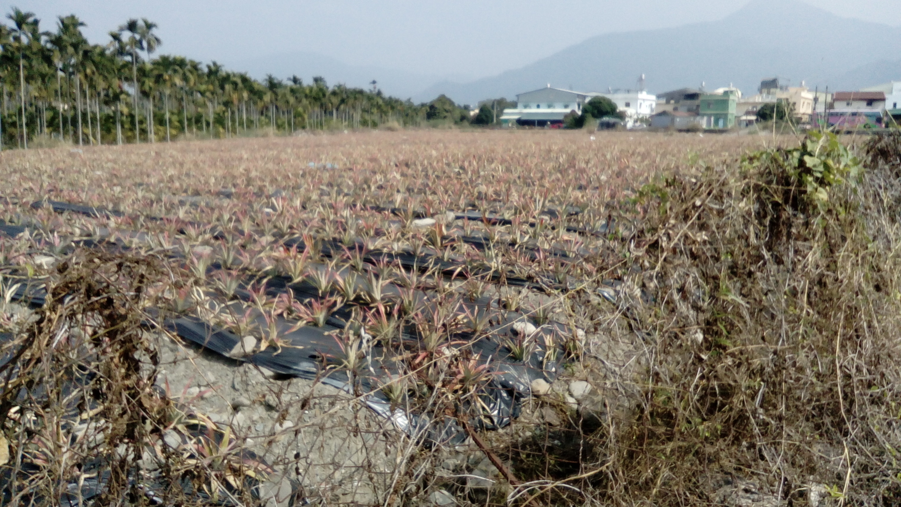 24線省道旁